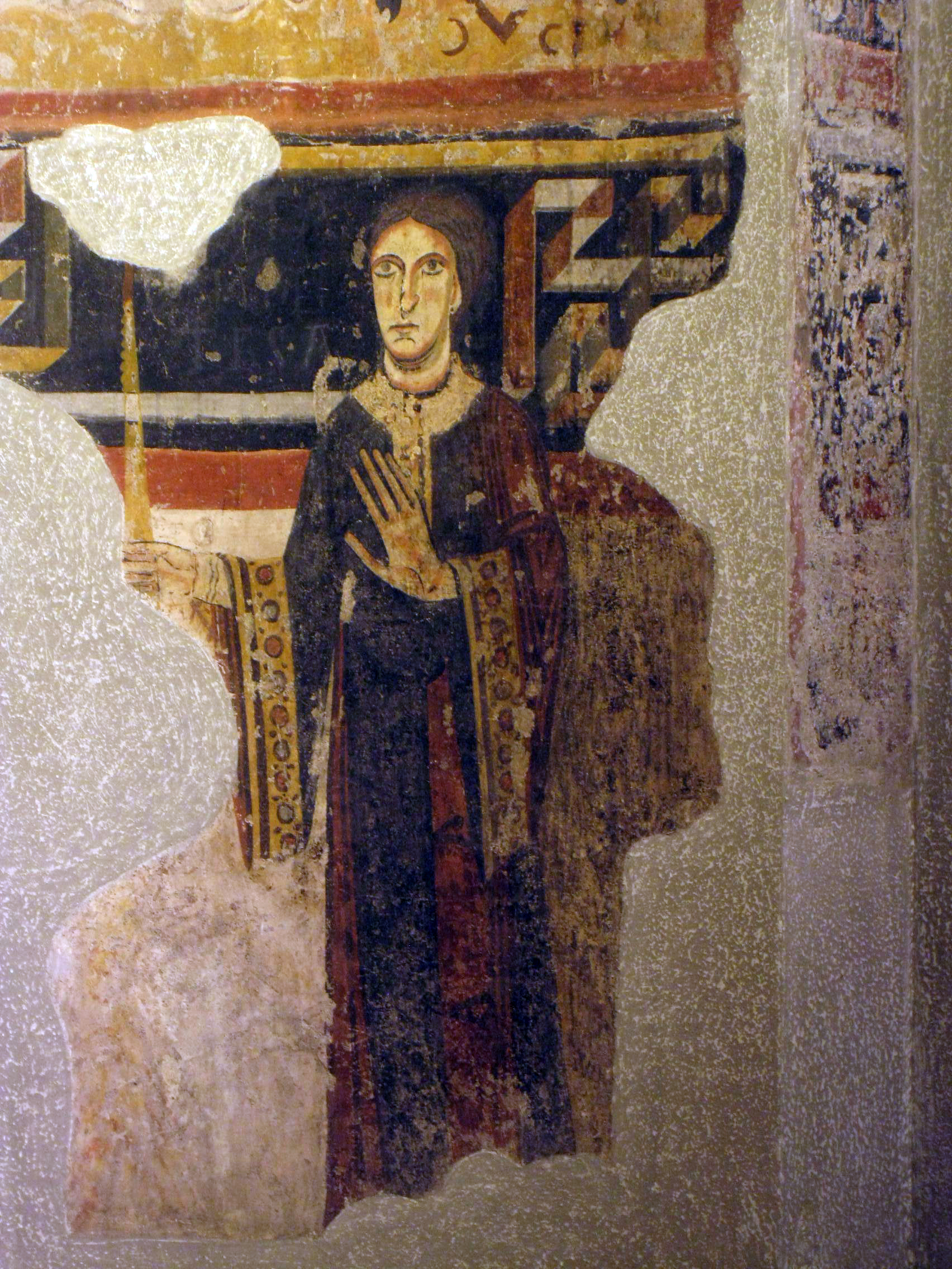 Palau Nacional (Barcelona)